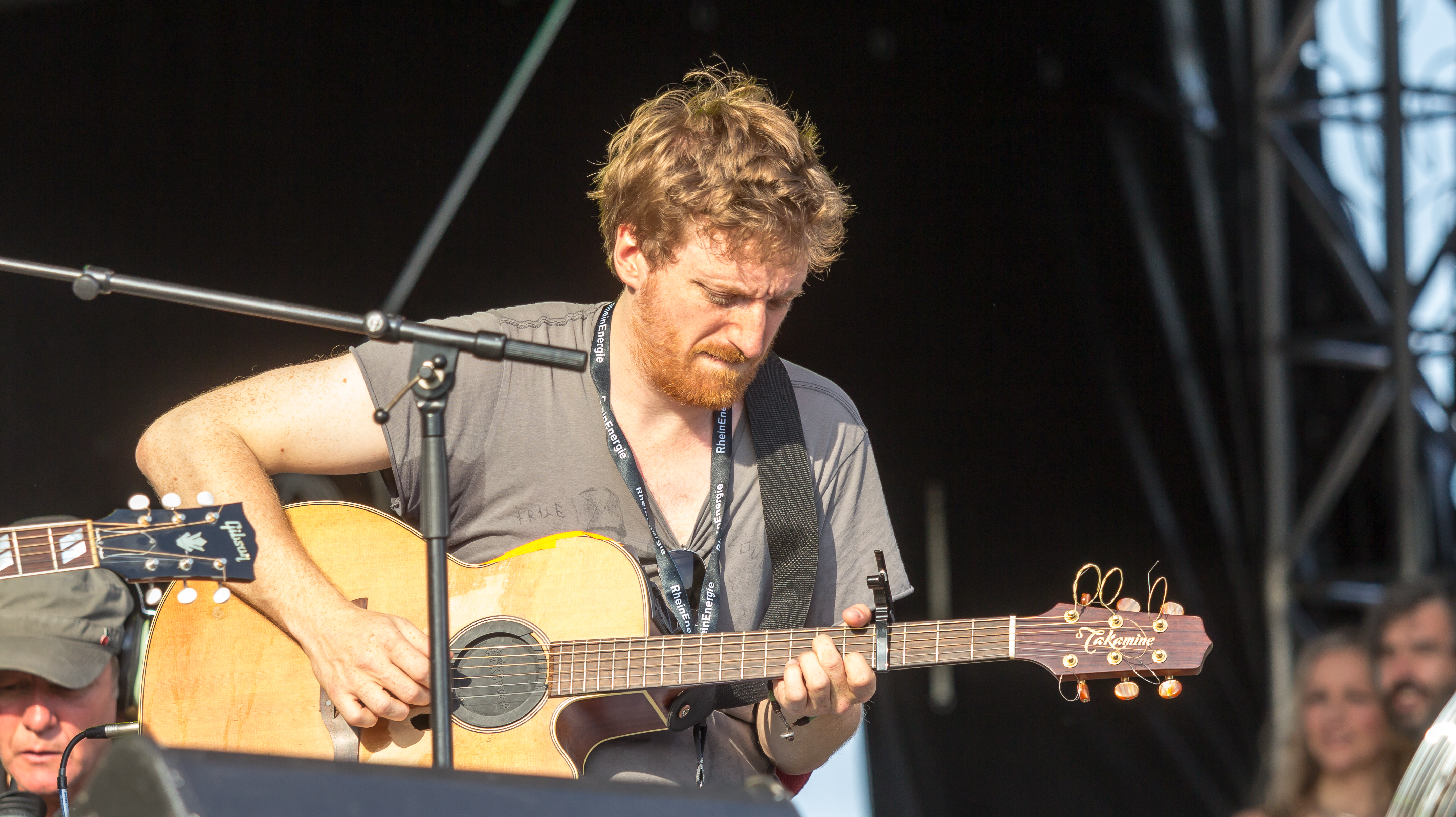 Birlikte - Kundgebung - Clueso